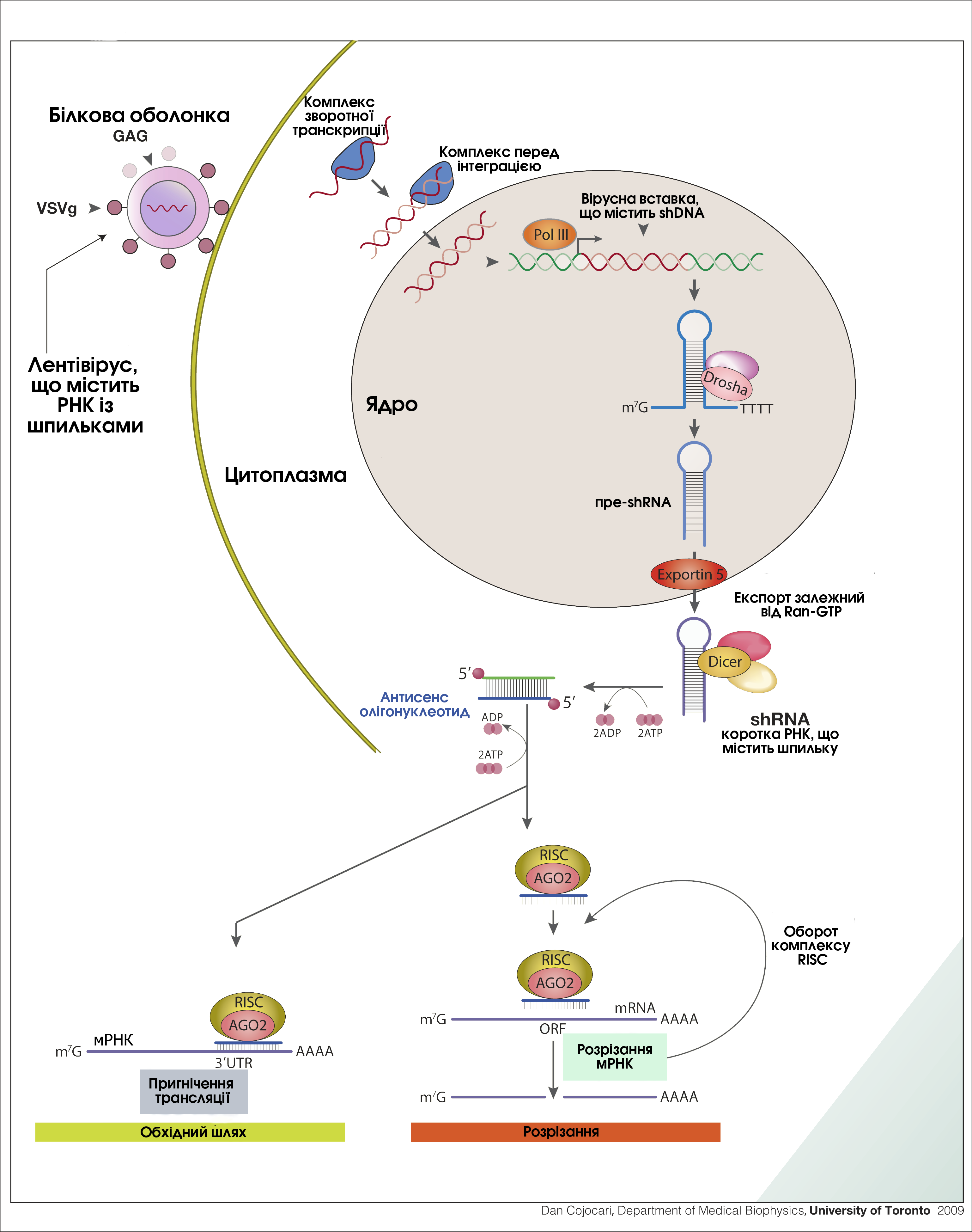 Доставка конструкту shRNA (малих РНК із шпильками) за допомогою лентівірусу для стабільної інтеграції у геном. Процесинг shRNA та механізм дії.